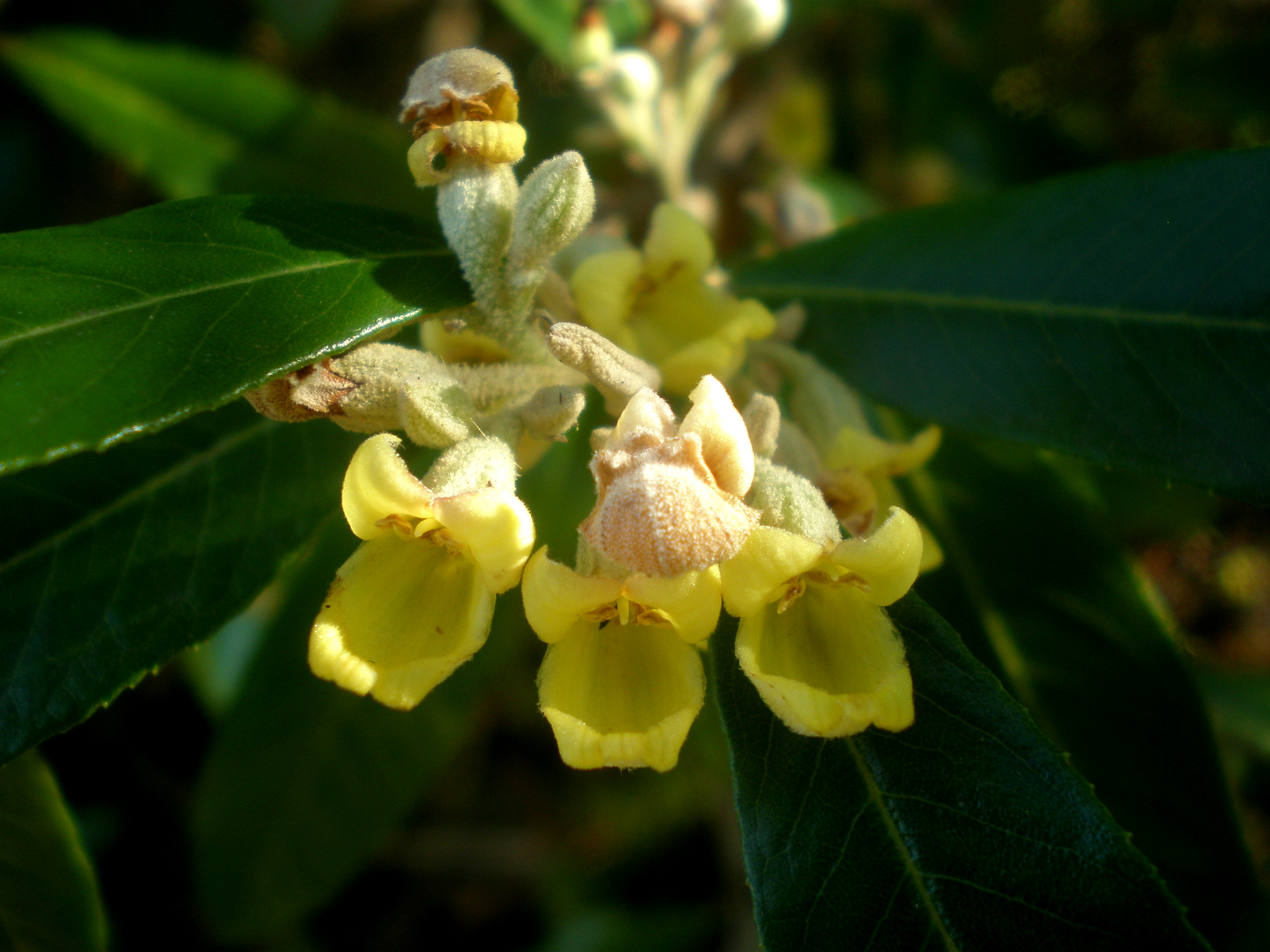 Jardín Botánico de Barcelona.